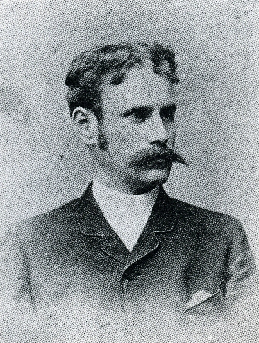 Paul Hartwig. Foto aus dem Henzen-Album, Nr. CCVII